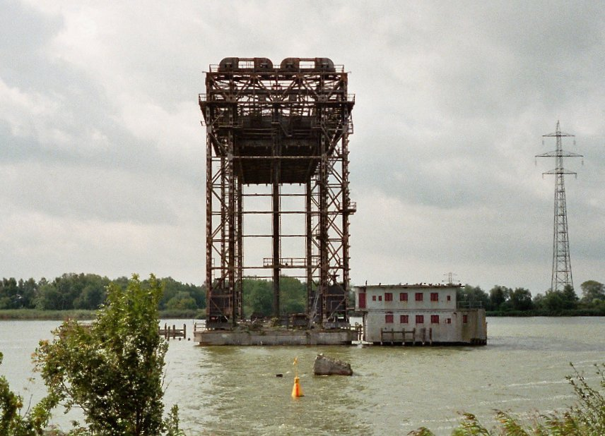 Rahmenkonstruktion in Stahl, hier: Hubbrücke von Karnin auf Usedom